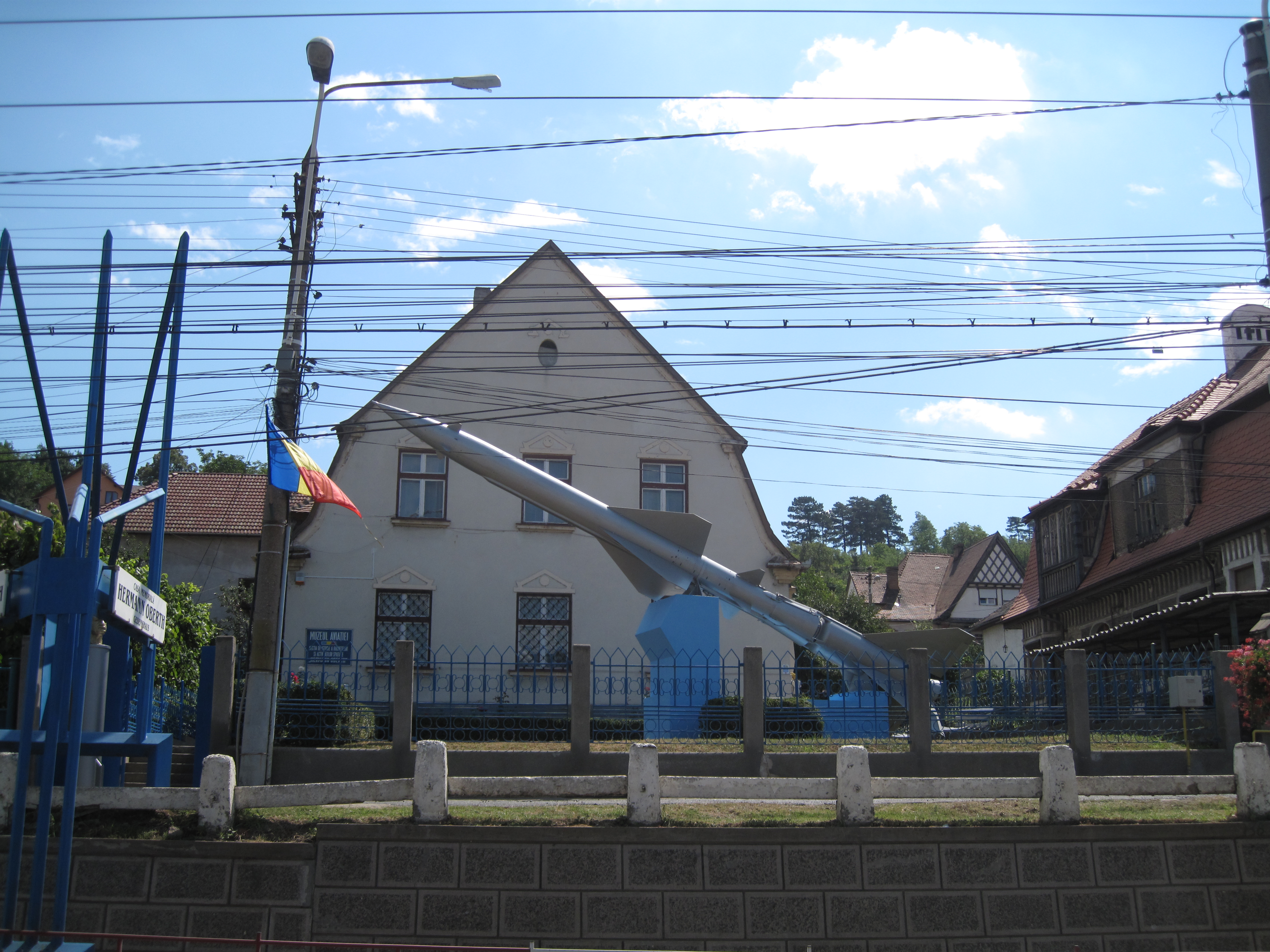 Hermann Oberth´s ehemaliges Wohnhaus und jetziges Museum in Medias (Rumänien)